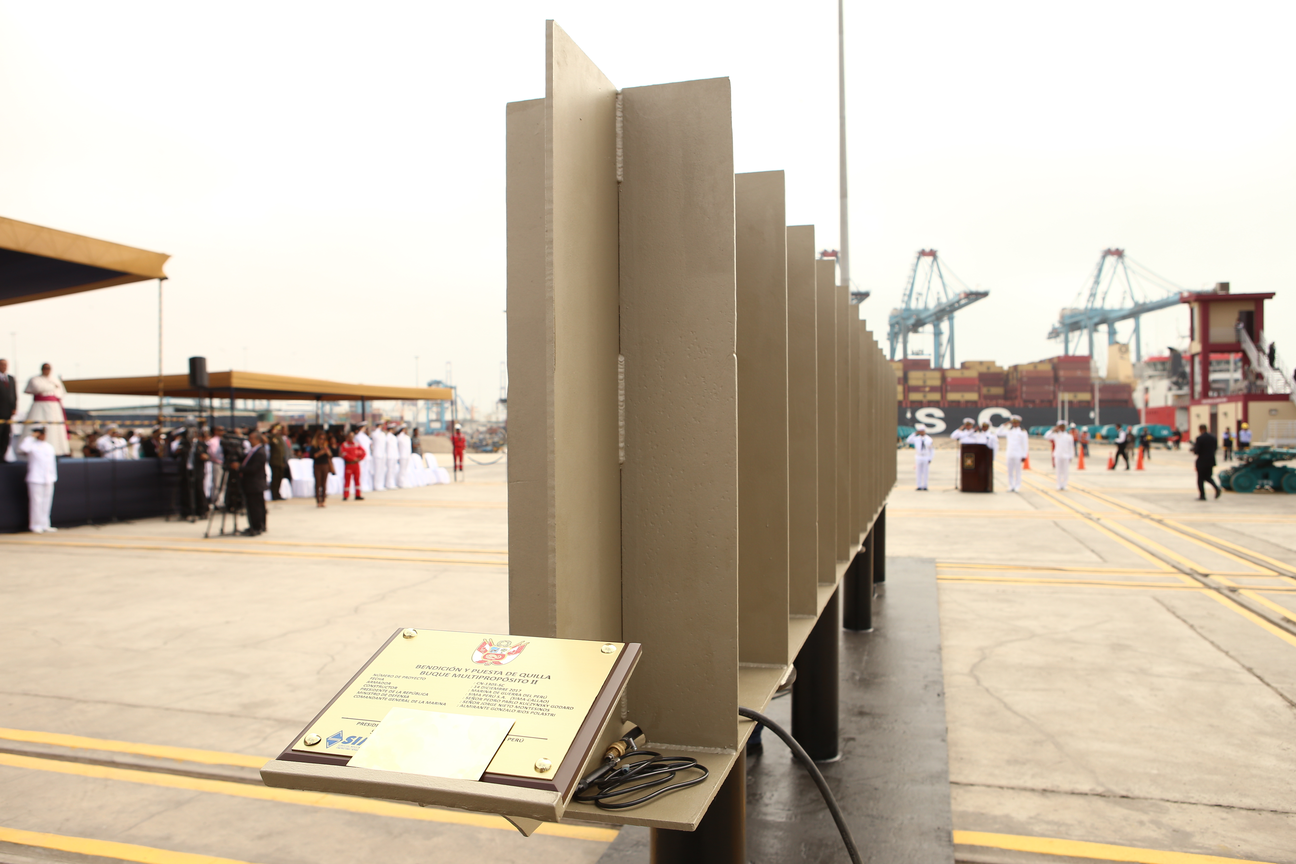 Puesta de la quilla de buque multiproposito "Paita" y ampliación de los servicios del Astillero.